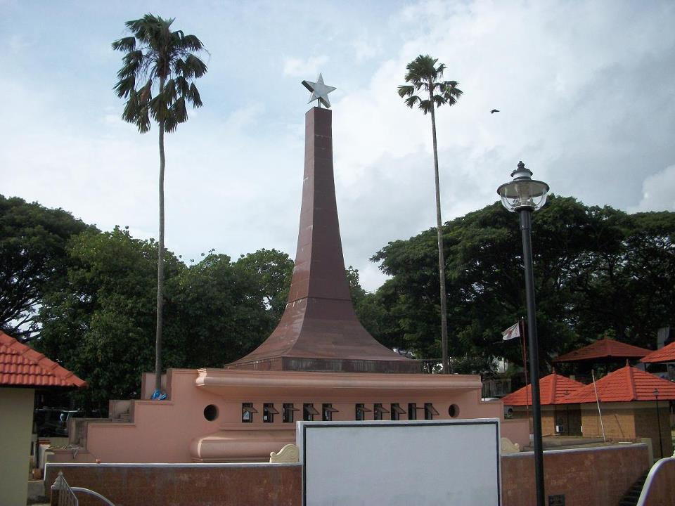 കൂത്തുപറമ്പ് രക്തസാക്ഷി സ്മാരകം